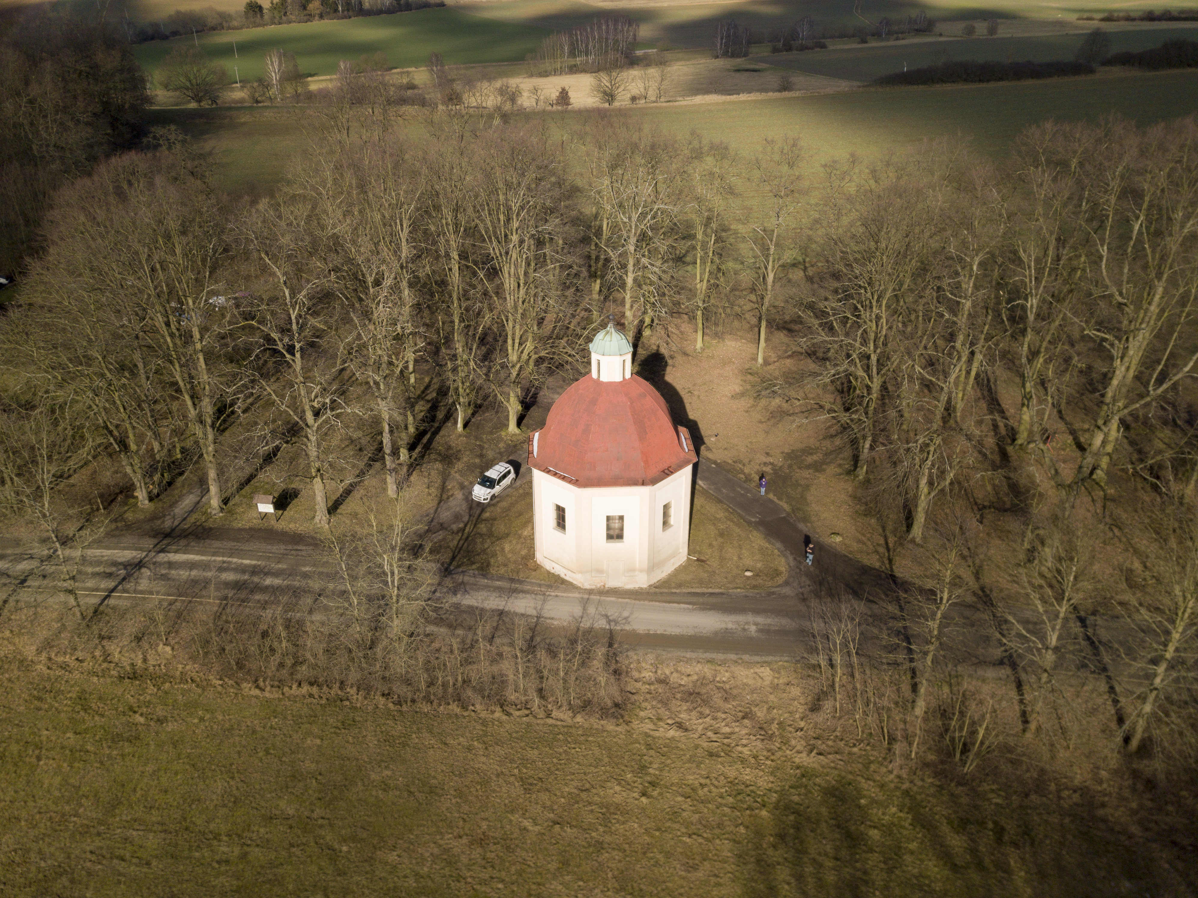 Kaple sv. Vojtěcha na Planinách.